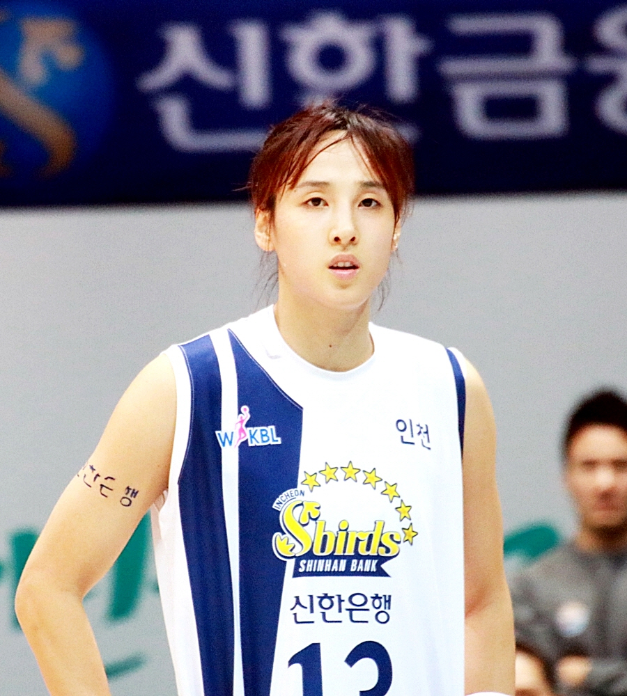 160101 여자농구 신한은행 vs 우리은행 직찍 2